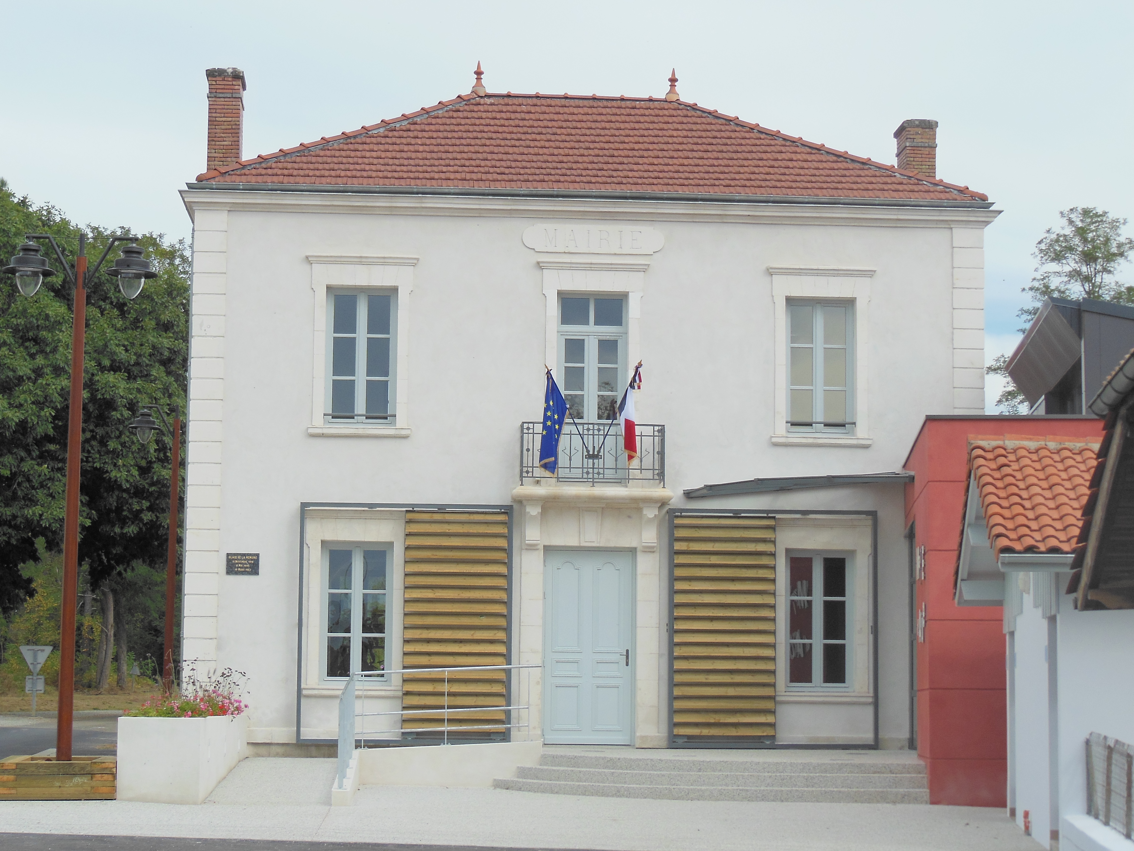 Mairie d'Arue, dans le département français des Landes